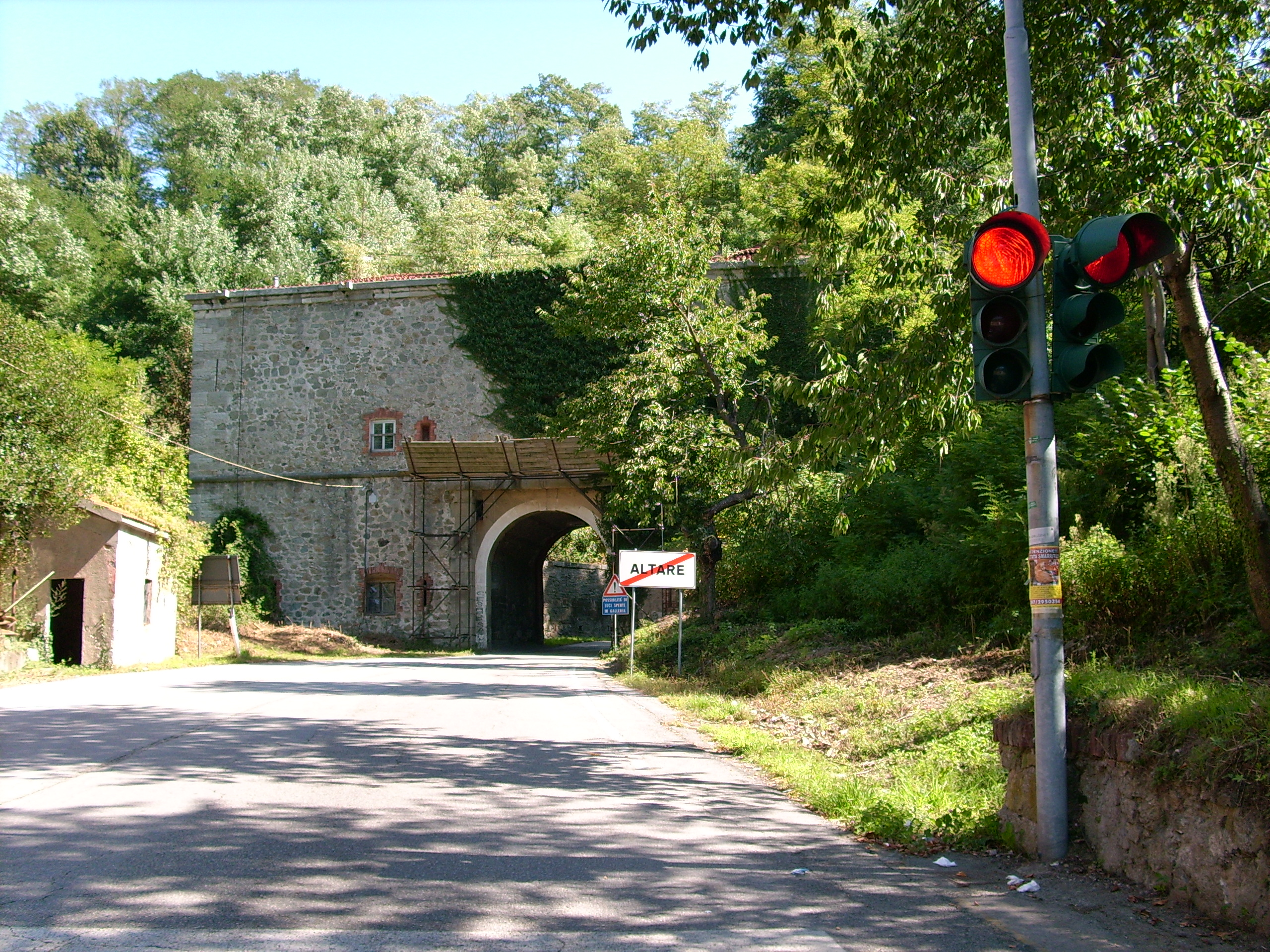 Altare, Liguria, Italia